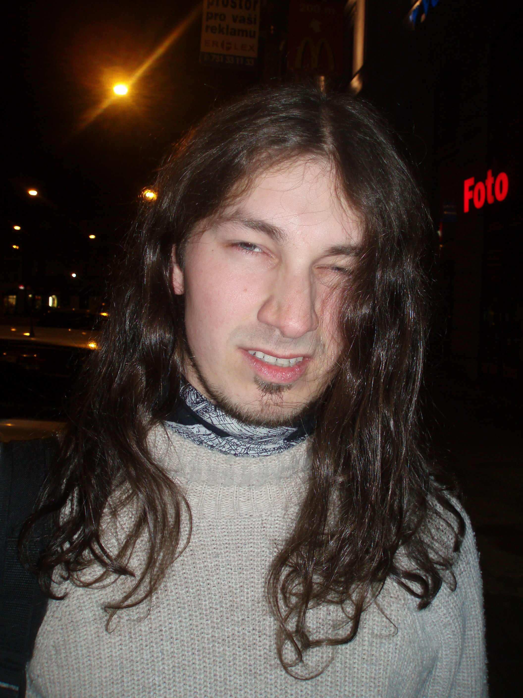 Ondřej Fencl frontman skupiny Nahoře Pes